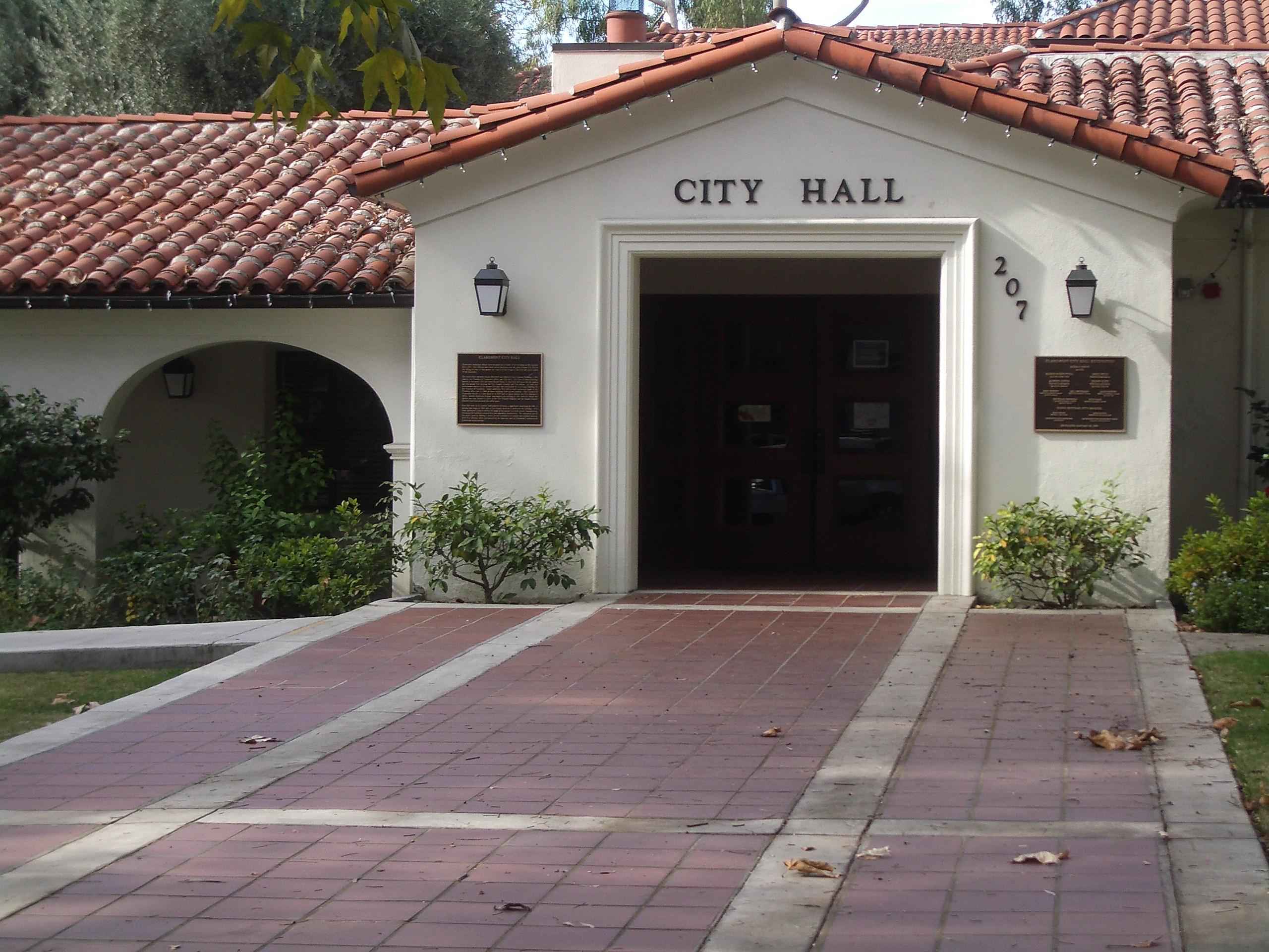 Claremont, CA